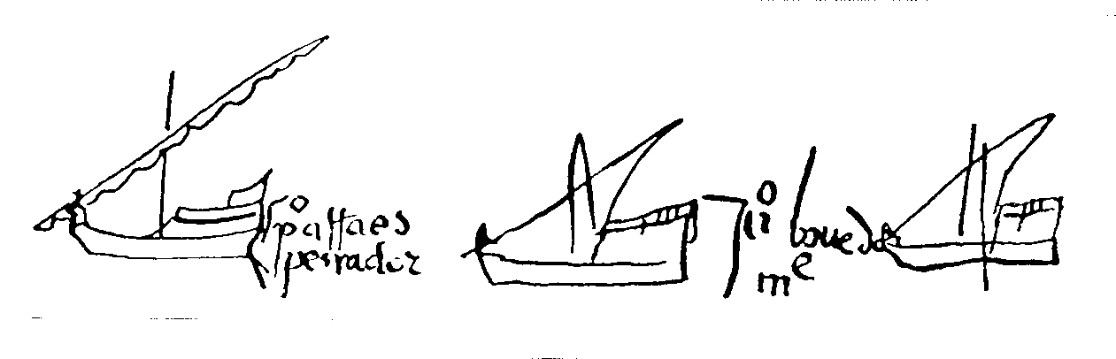 Одномачтовые каравеллы в подписях испанских моряков. XV век